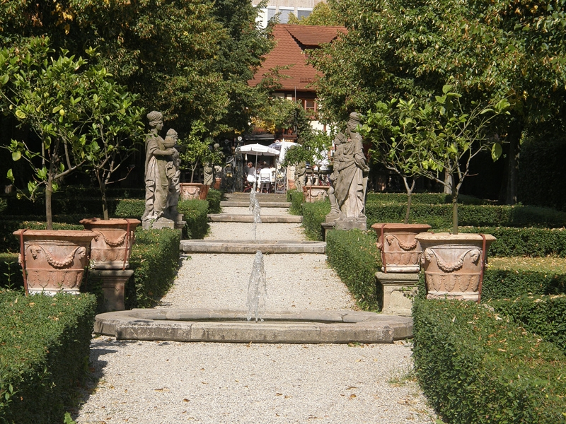 Nürnberg